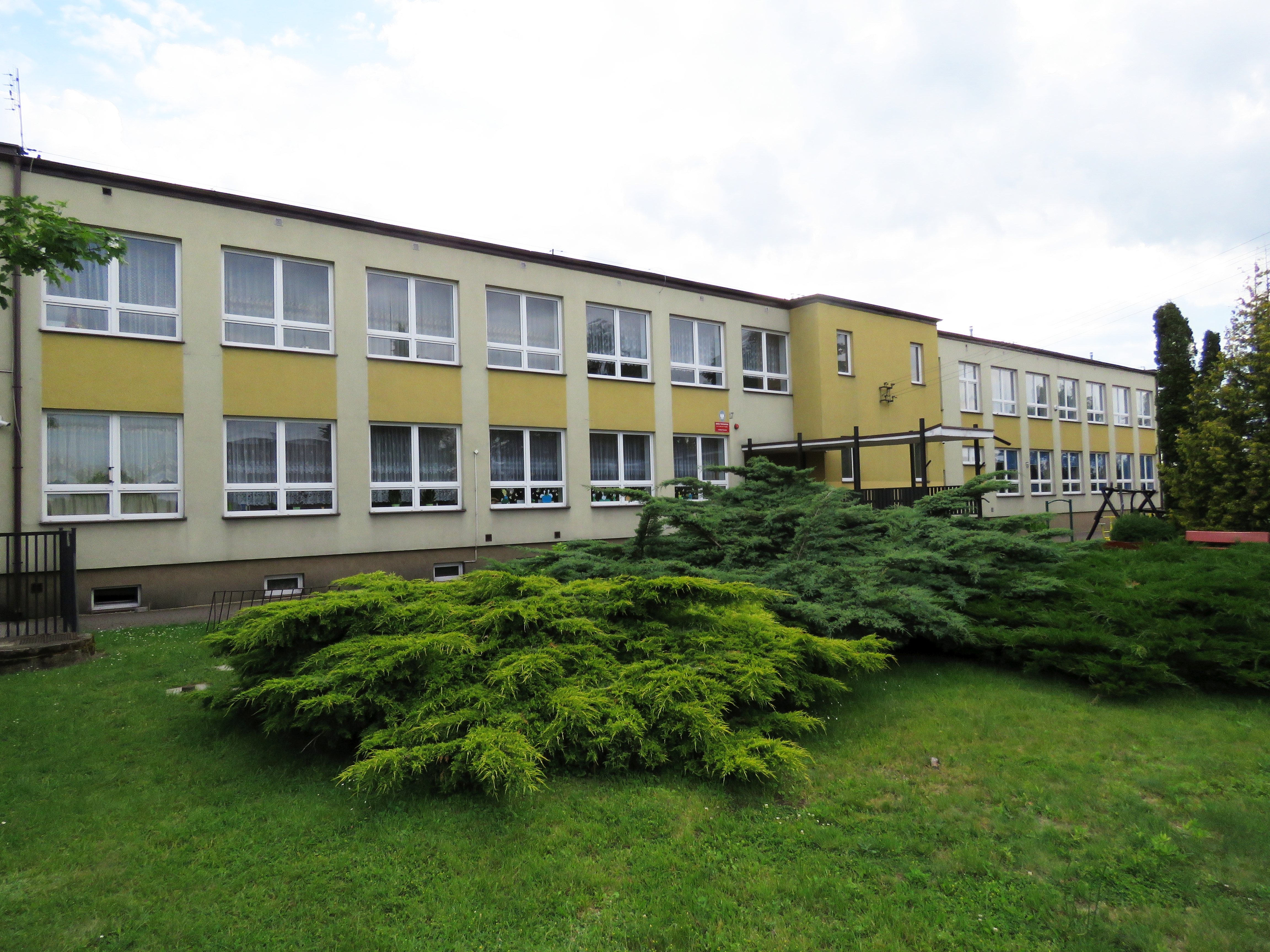 Budki Piaseckie